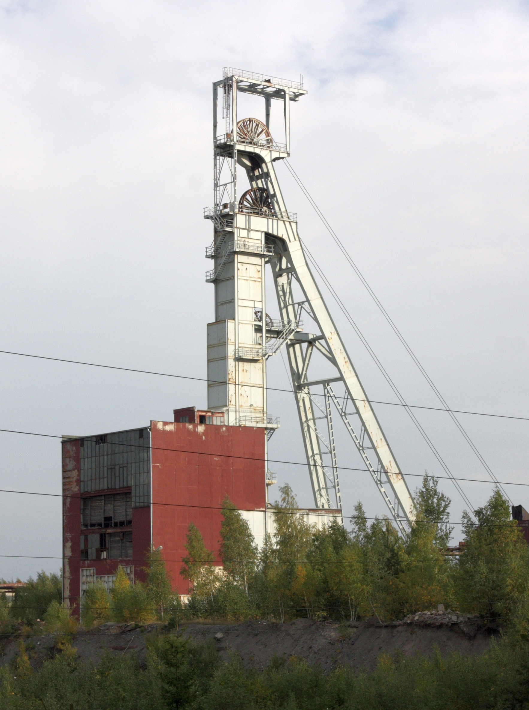 Uranový důl Rožná I, těžní věž R 3 Jasan (bývalý důl Rožná II).